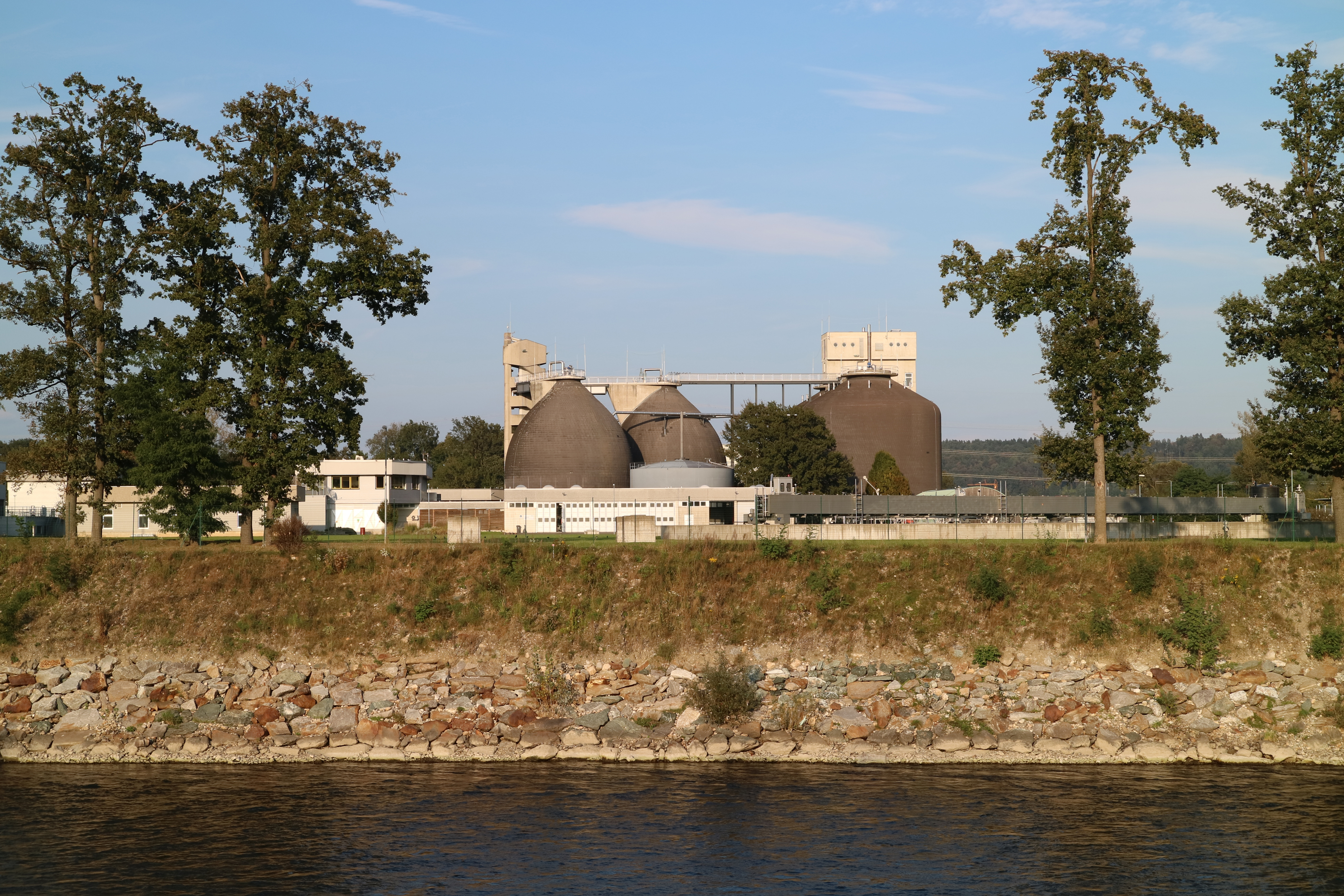 Faultürme der Kläranlage Graz in Gössendorf, im Vordergrund die Mur